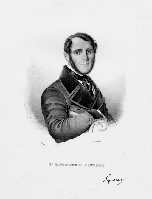 Bartolomeo Signoroni